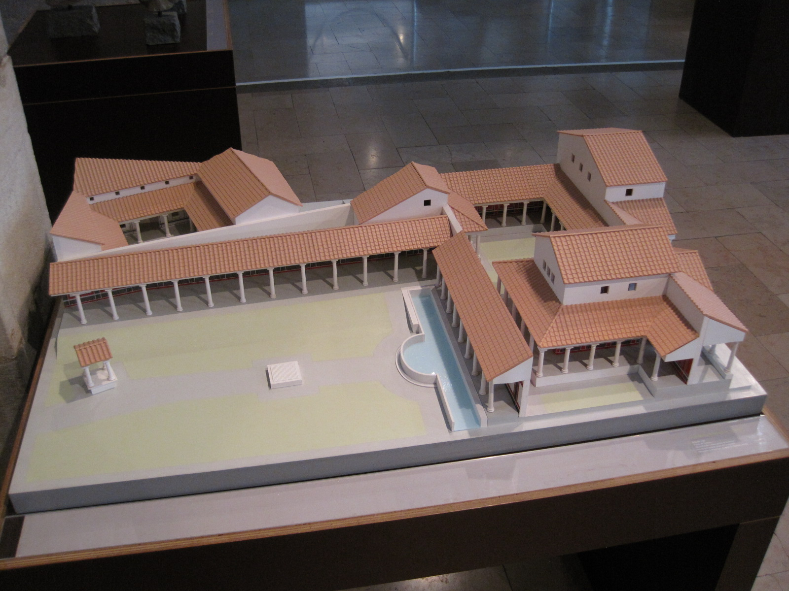 Reconstitution de la domus gallo romaine du Palais de Justice Besançon - Archéologie au Musée des Beaux-Arts de Besançon